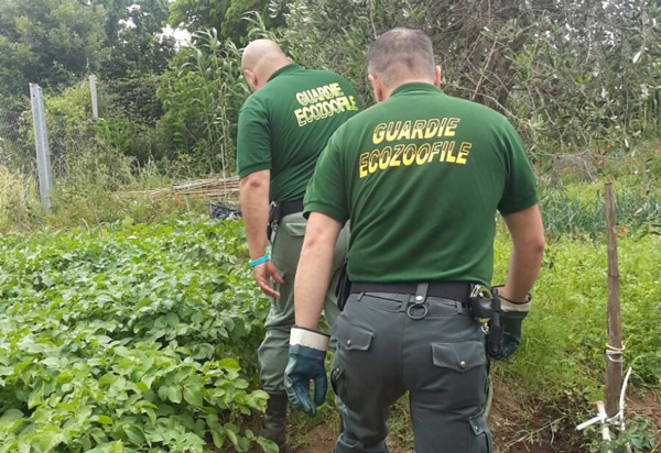 Guardie Ecozoofile effettuano controlli